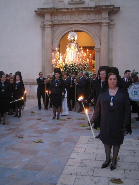 Procesión de Nuestra Señora de Loreto, año 2007 Algezares (Murcia) Spain